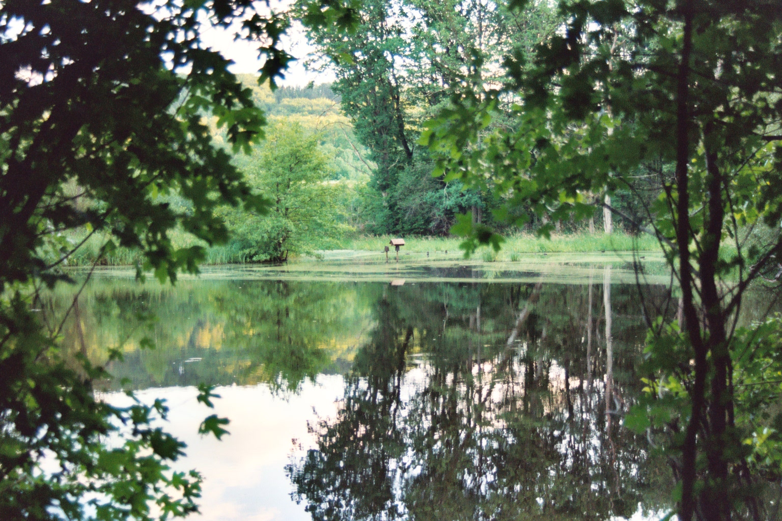 See im Kupfermoor am Fuß der Waldenburger Berge (2004).